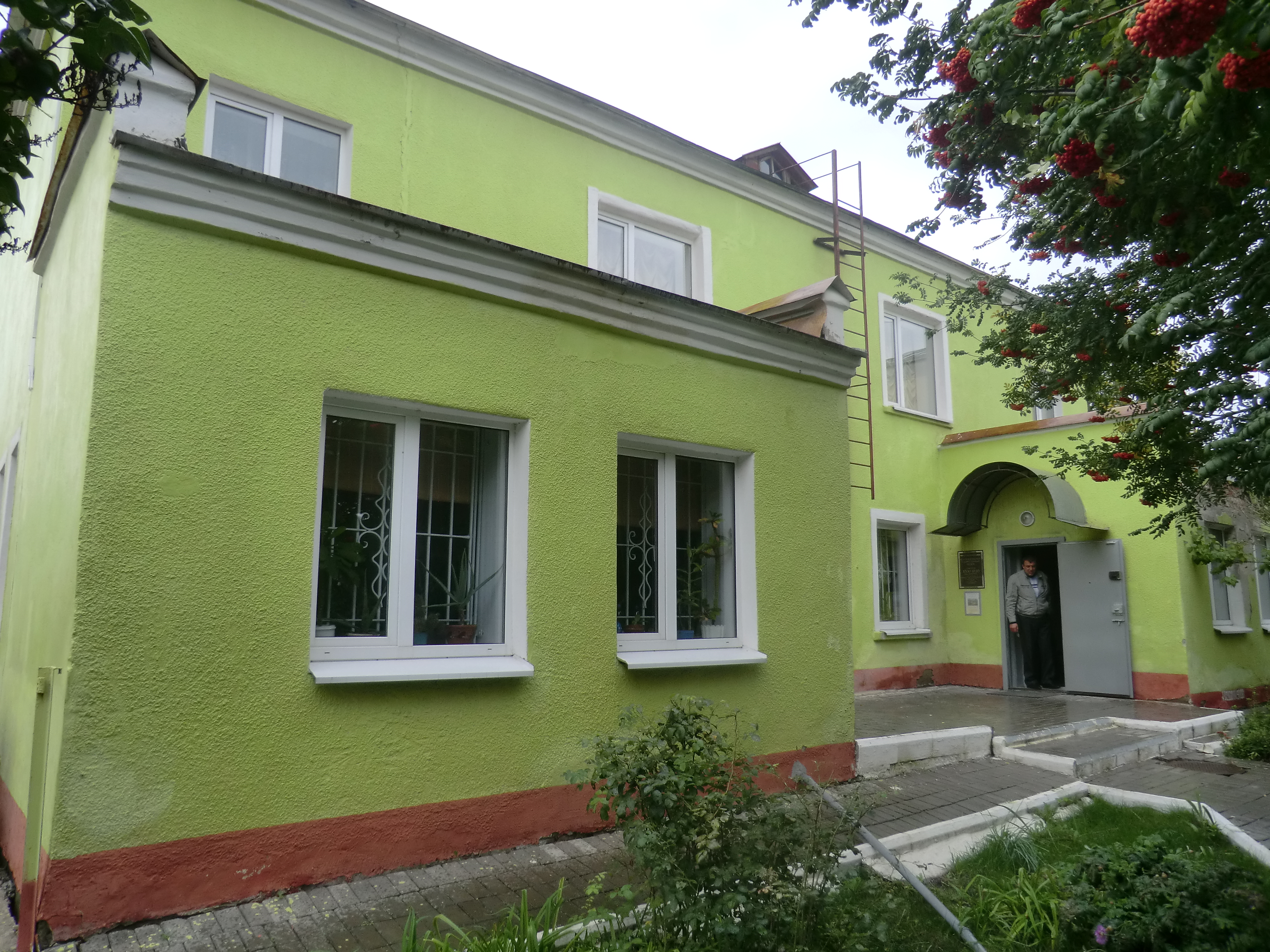 (Белгородская область, Старый Оскол, улица Ленина, 57)